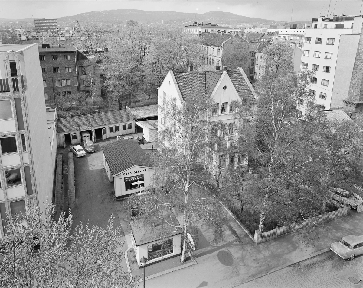 Industrigata 38 i 1964. Bensinstasjonen og murhuset er revet og erstattet med en bygård. Foto: Leif Ørnelund, fra Byhistorisk samling hos Oslo Museum.